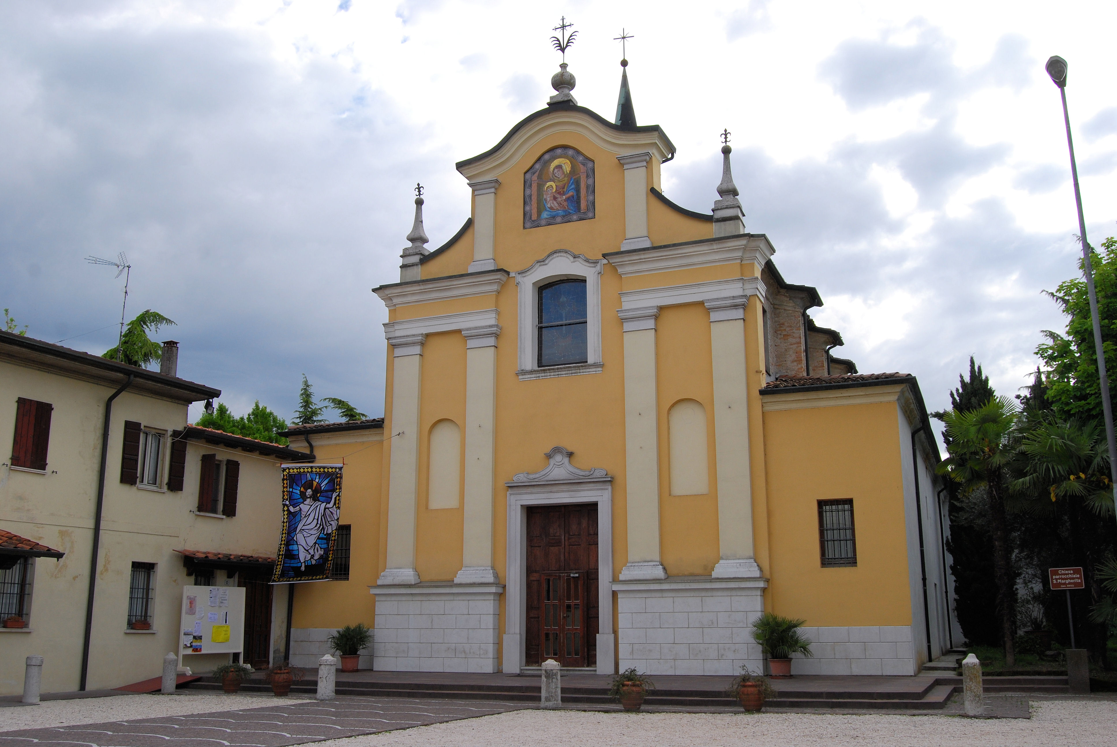 Castelnuovo Asolano, chiesa di Santa Margherita.